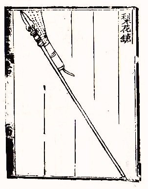 梨花鎗示意圖